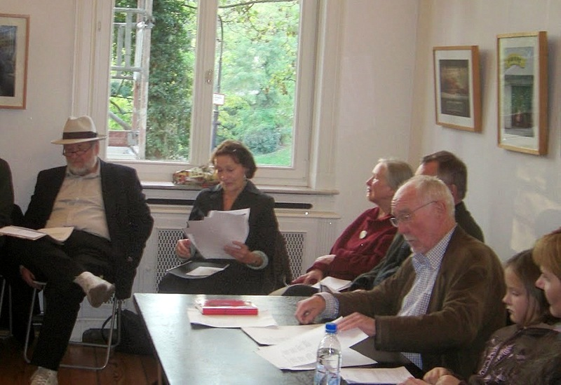 Günter Bommert reading Günter Eich, Villa Ichon